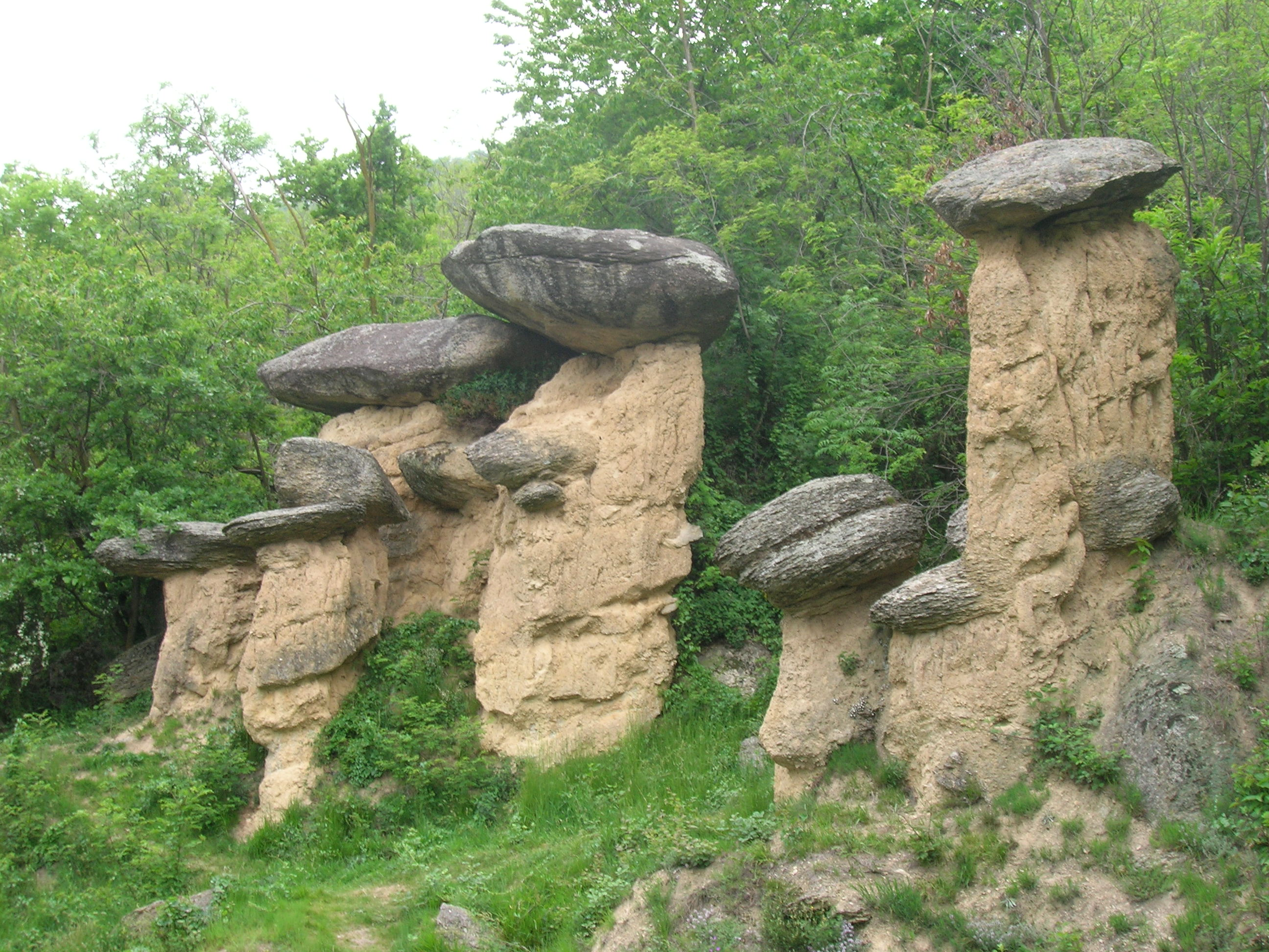 "Riserva naturale speciale dei Ciciu del Villar" - Villar San Costanzo (Cuneo, Piemonte, Italy)